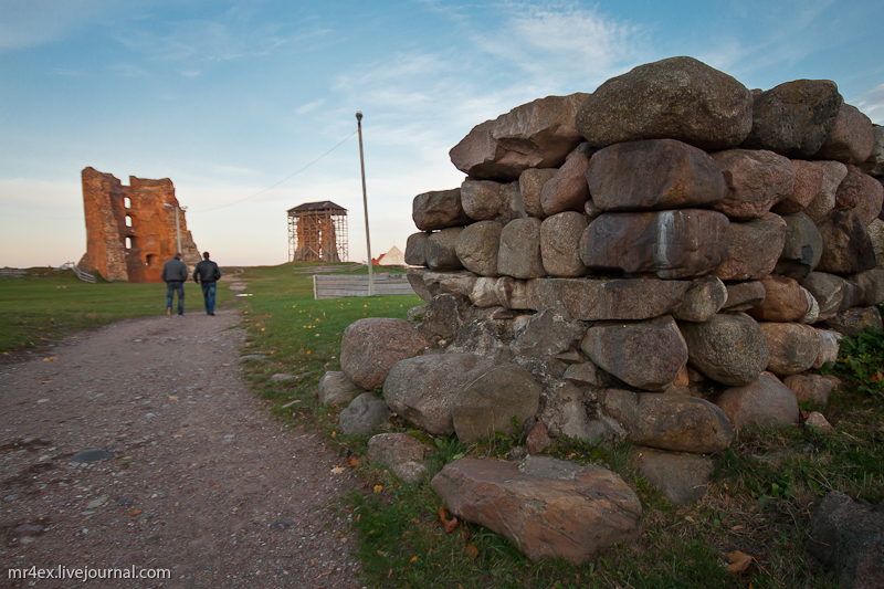 Узыход на Замкавую гару